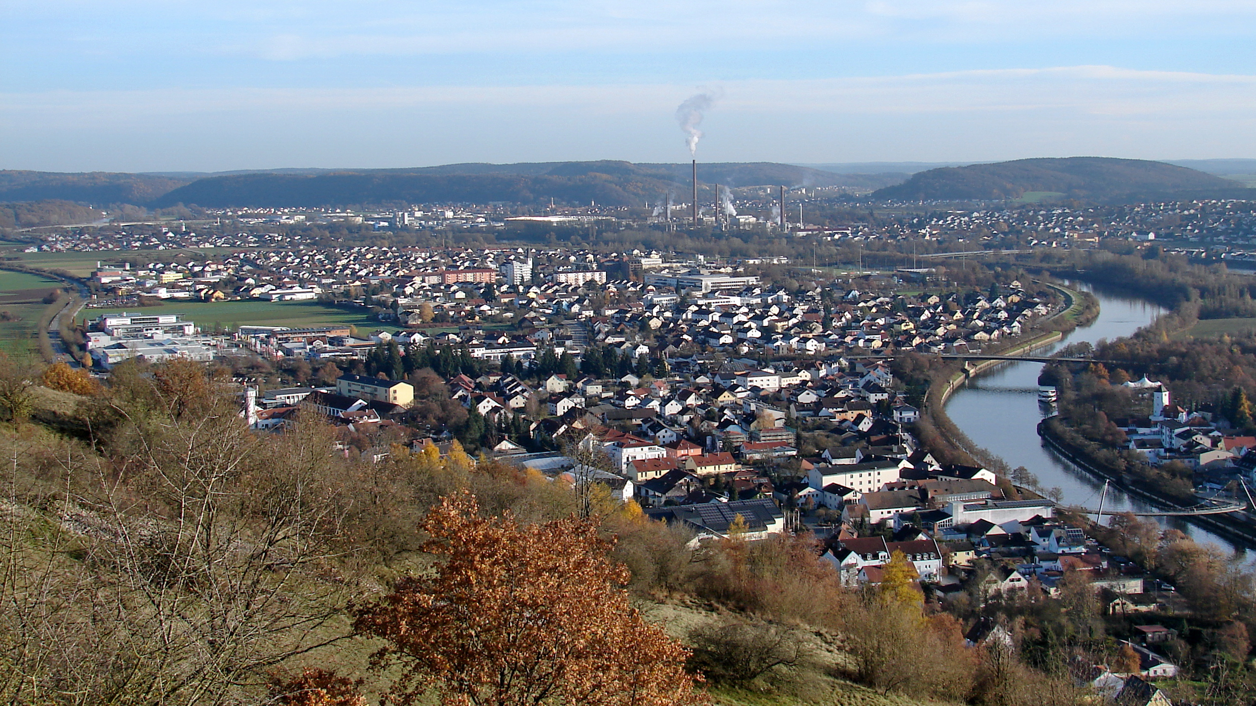 Kelheim ist die Kreisstadt des gleichnamigen Landkreises im Regierungsbezirk Niederbayern.